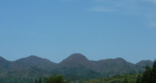 busugamori